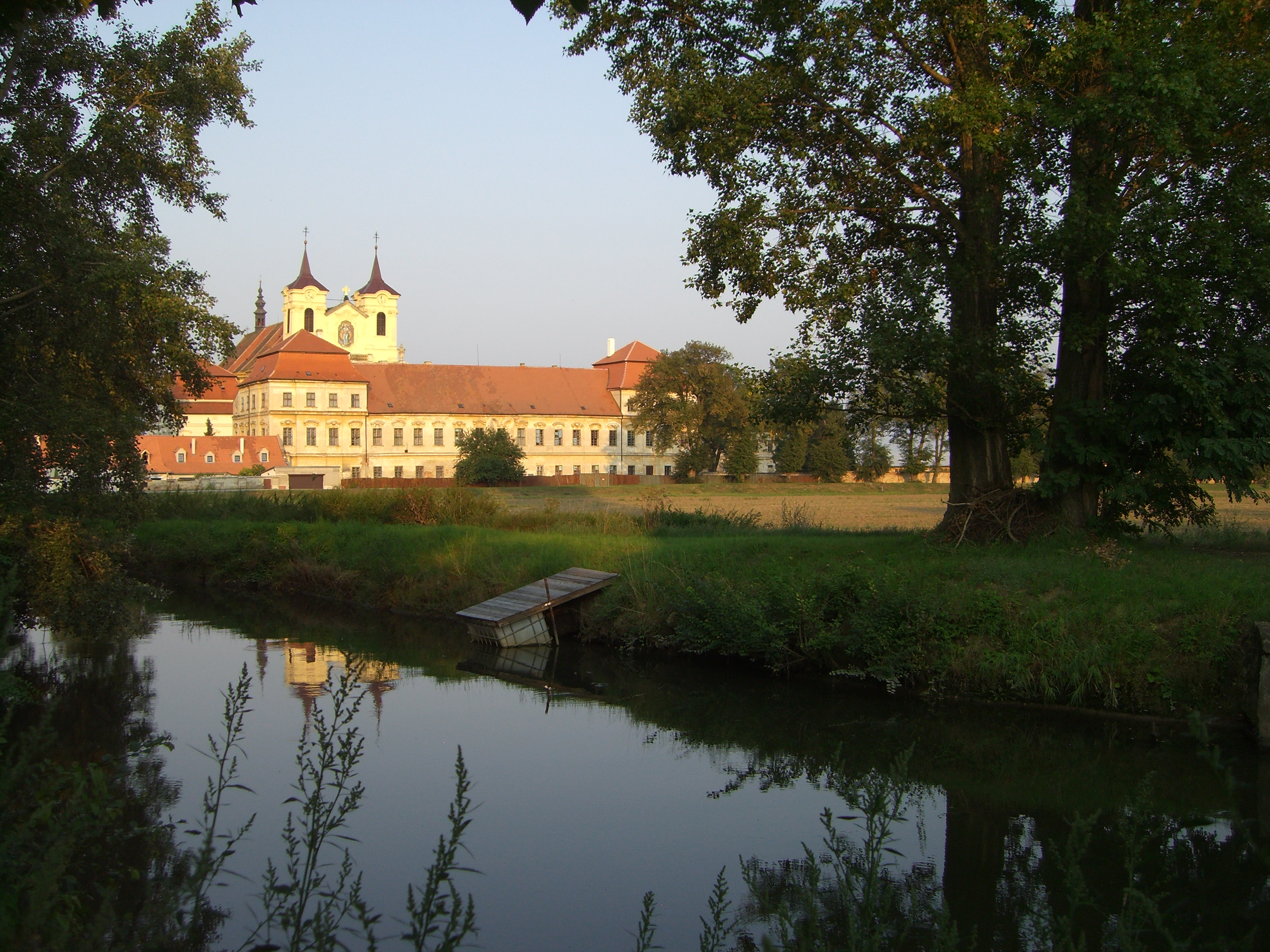 Od mlýna (Jihomoravský kraj, Brno-venkov, Rajhrad)